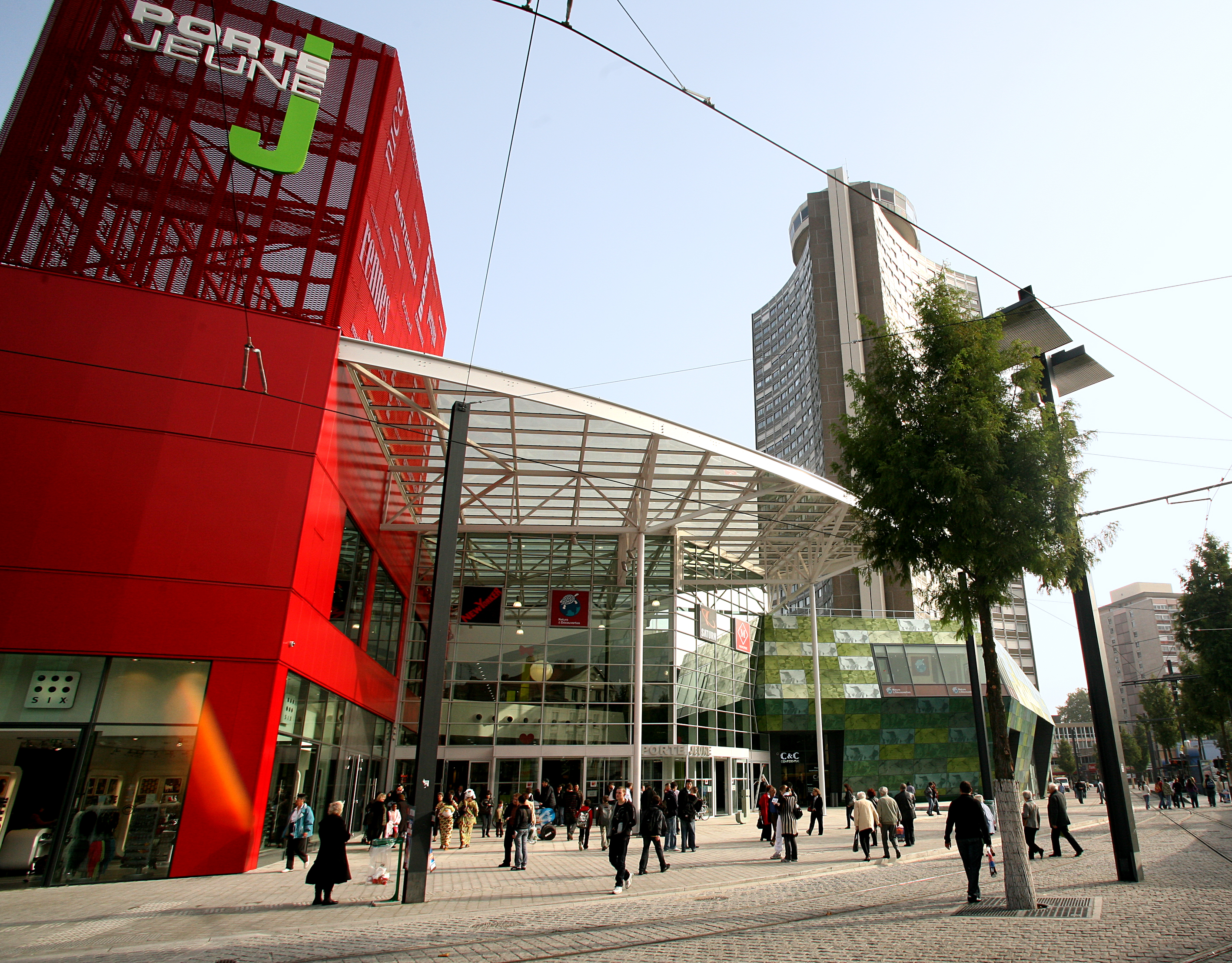 Centre commercial Porte Jeune phototheque Mairie de Mulhouse Libre de droit